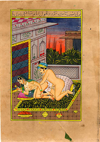 Kama Sutra Illustration